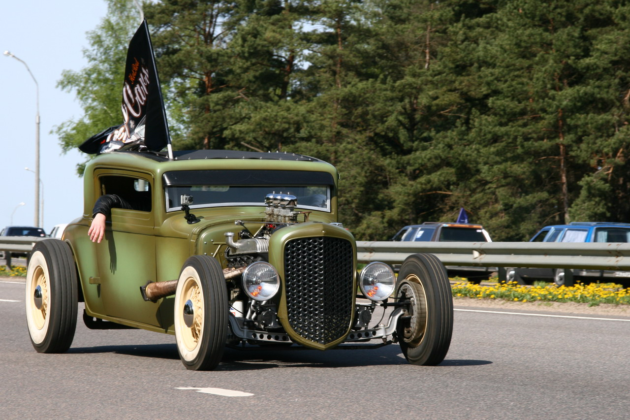 Chrysler Hot Rod 1928 на слете Ретро-Минск 2014